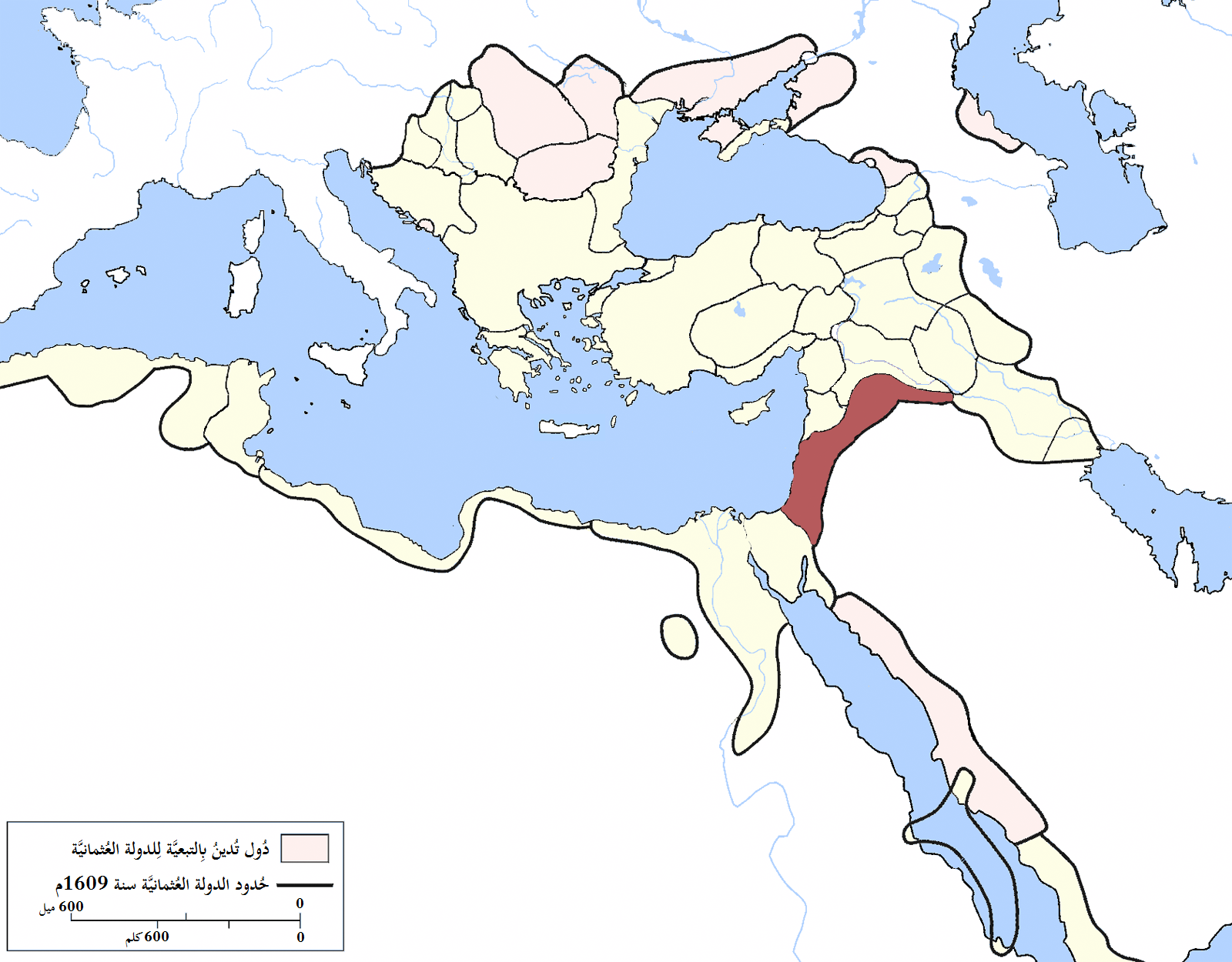 إيالة دمشق بِالدولة العُثمانيَّة سنة 1609م.